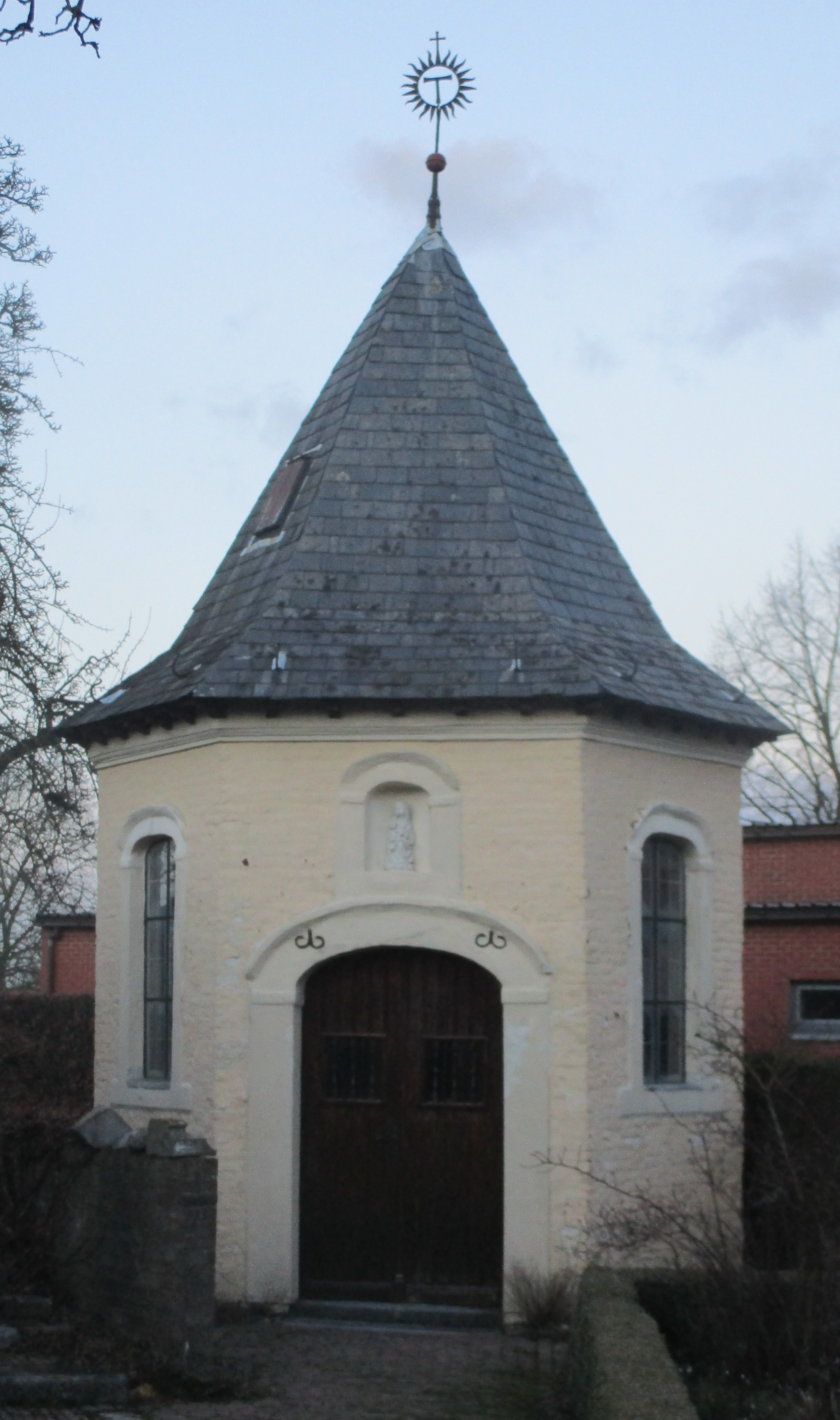 Zeshoekig bakstenen kapel van voor 1685 in Kozen (Nieuwerkerken)